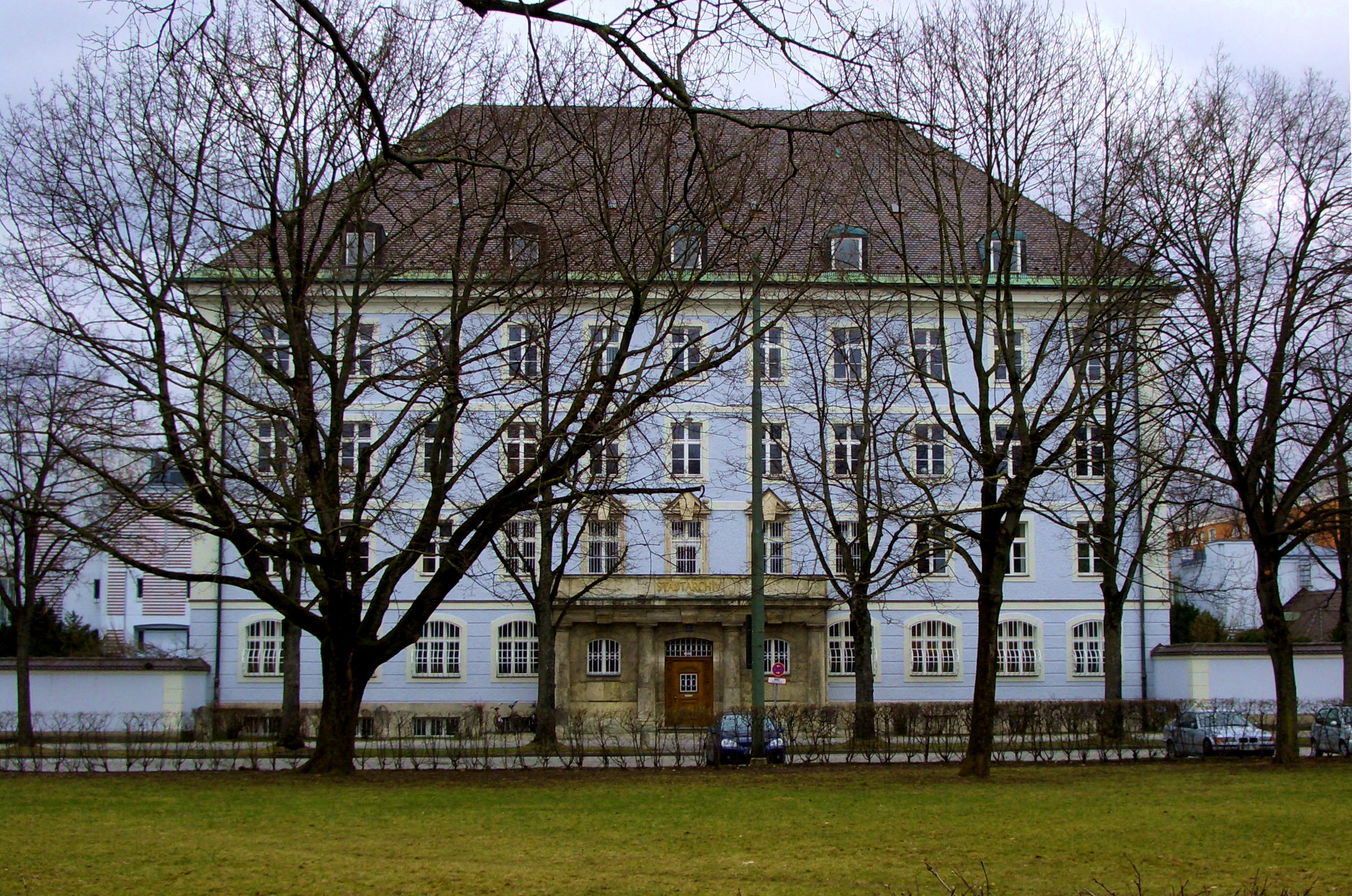 Stadtarchiv München von Westen; ehemals Städtisches Wehramt